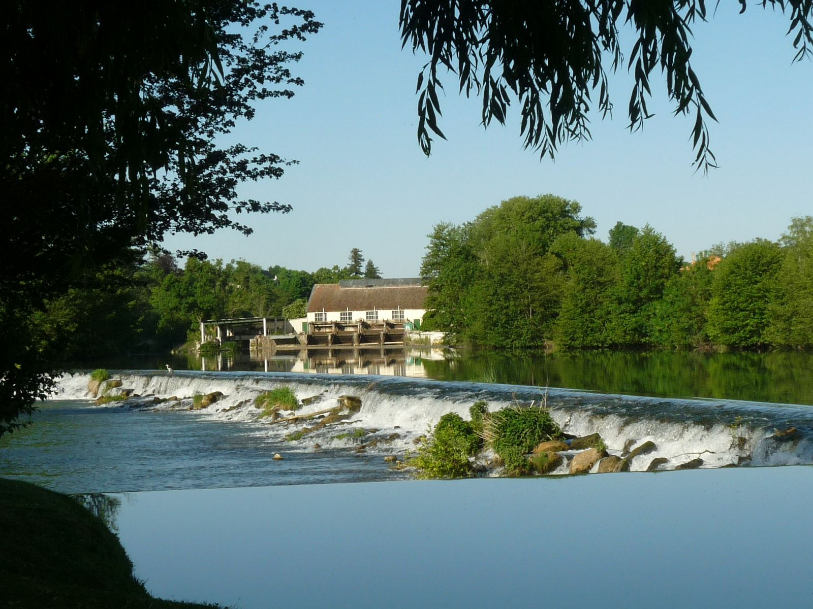 la Charente à l'écluse de la Motte, Nersac, Charente, France